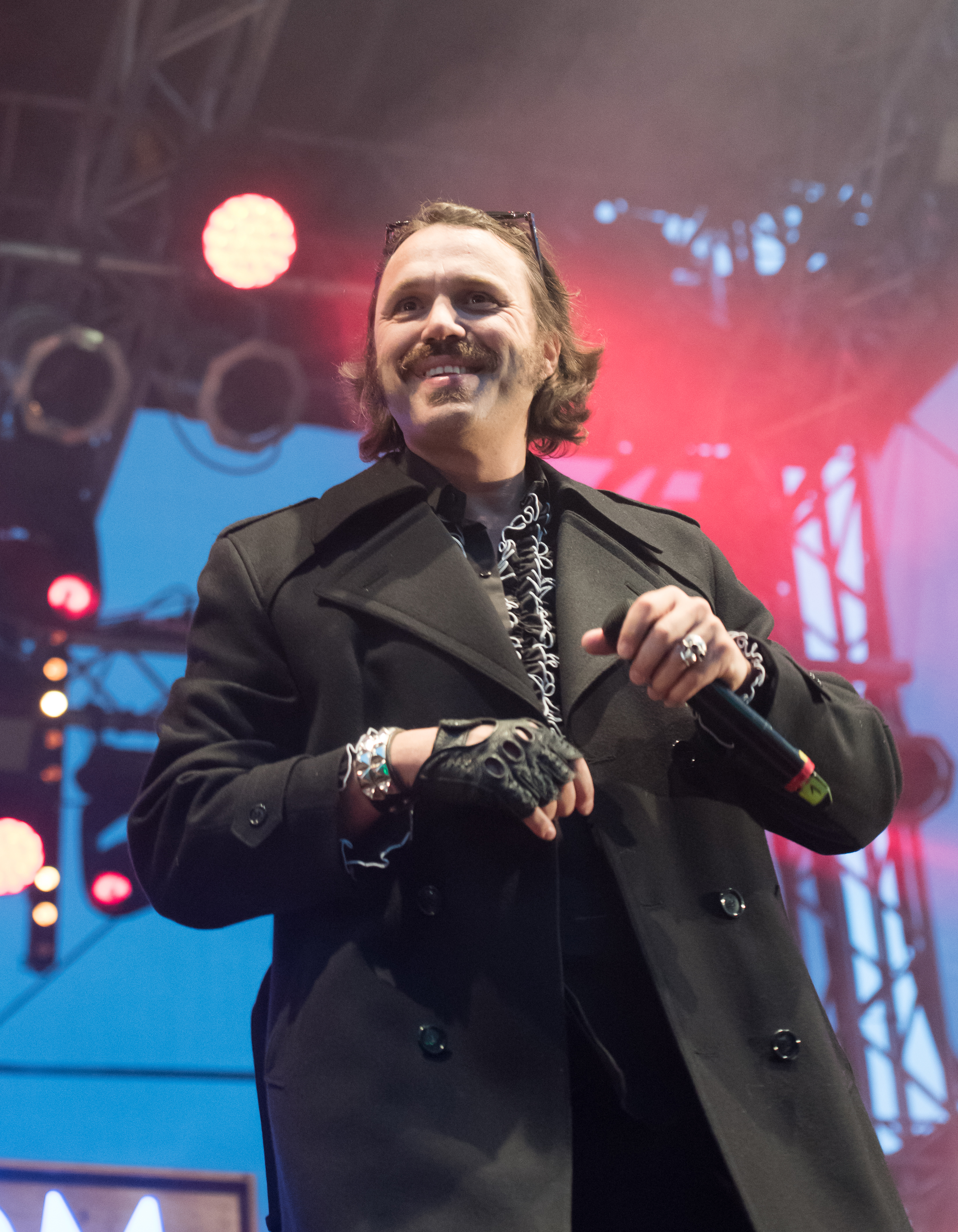 Christian Steiffen auf dem Holsten Brauereifest 2017